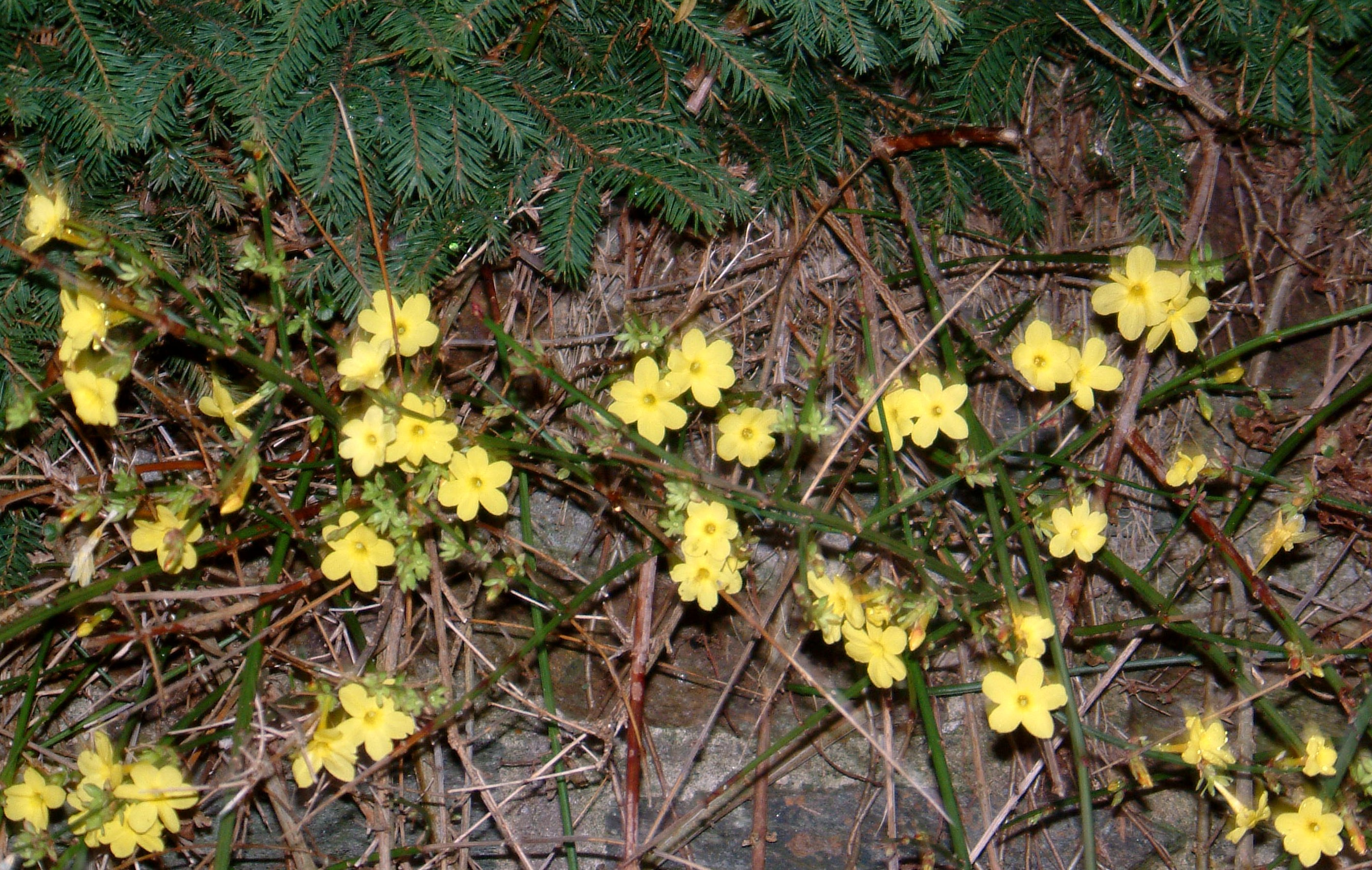 Winterjasmin in Sachsen auf 400 m ü. M.